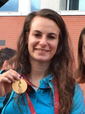 Renate Jansen EK2017 damesvoetbal medaille